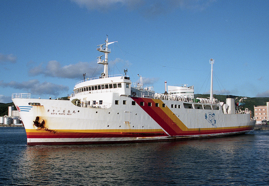 東日本海フェリー 第十一宗谷丸